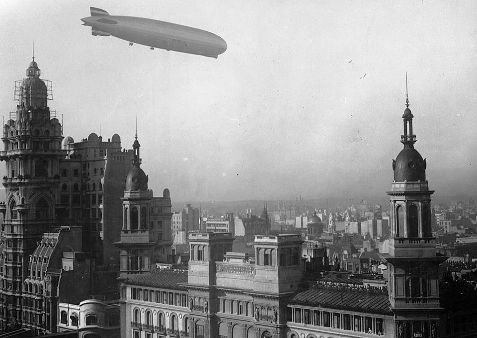 El Graf Zeppelin sobrevolando la Avenida de Mayo, en Buenos Aires, Argentina. Se destaca el edificio del Palacio Barolo.